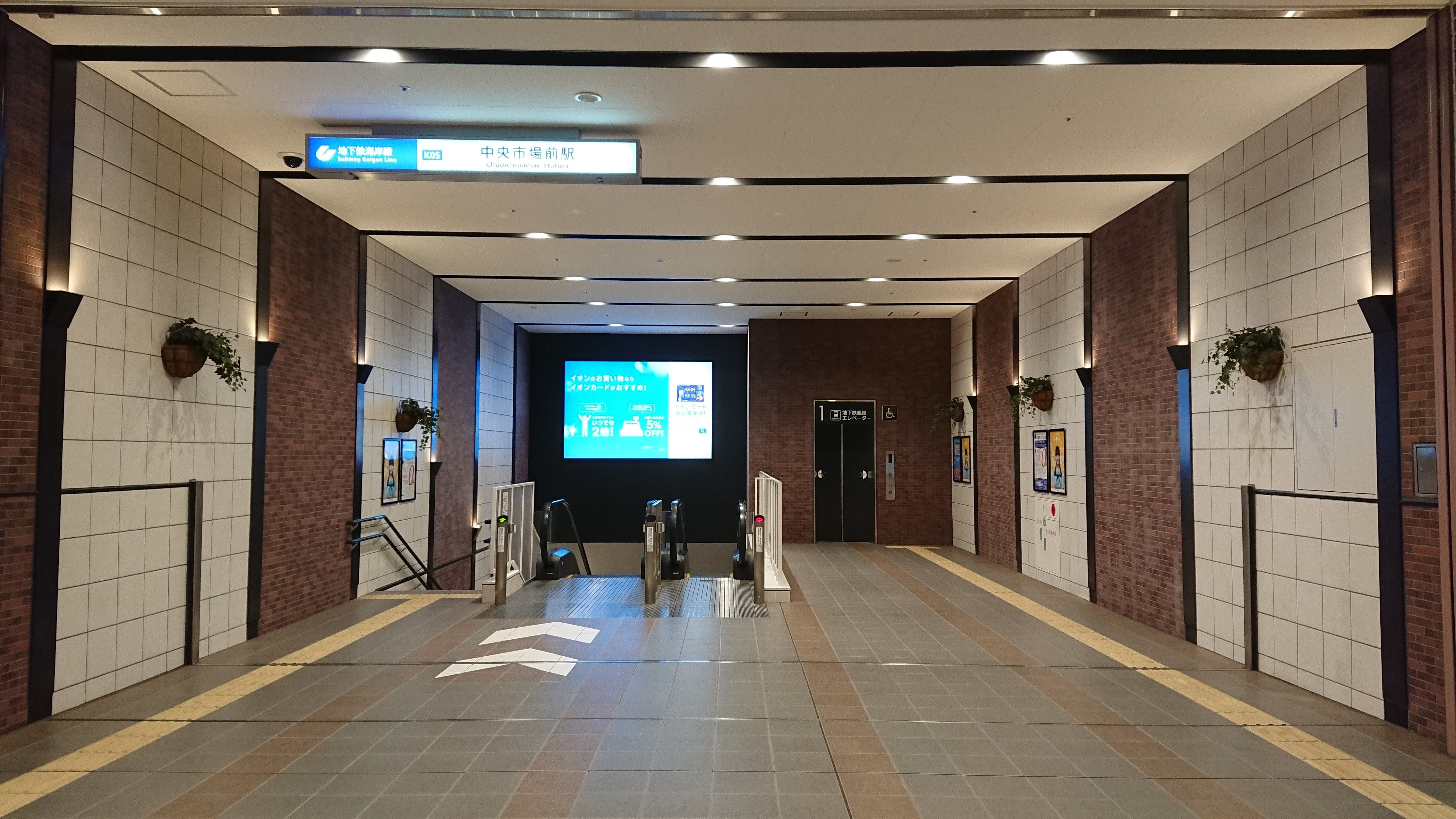 神戸市交通局（神戸市営地下鉄）海岸線 中央市場前駅 イオン連絡通路口